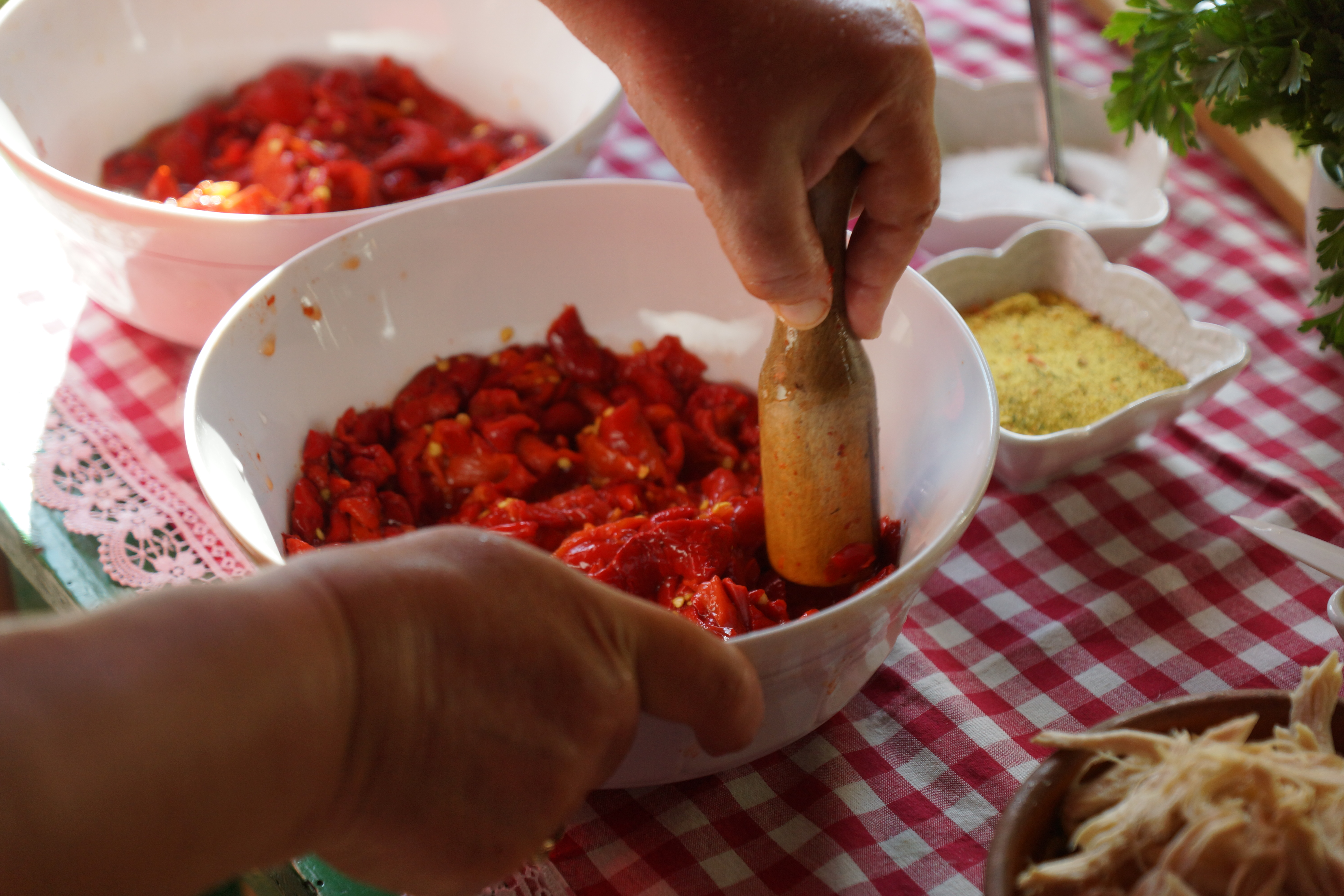 Priprema klucane salate